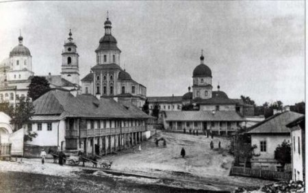 Територія Софроєнівського монастиря (вигляд з подвір'я) на поч. ХХ ст.